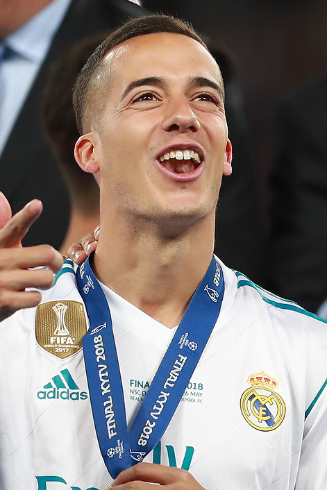 Финал ЛЧ в Киеве: 13-й кубок «Реала» и слёзы «Ливерпуля»